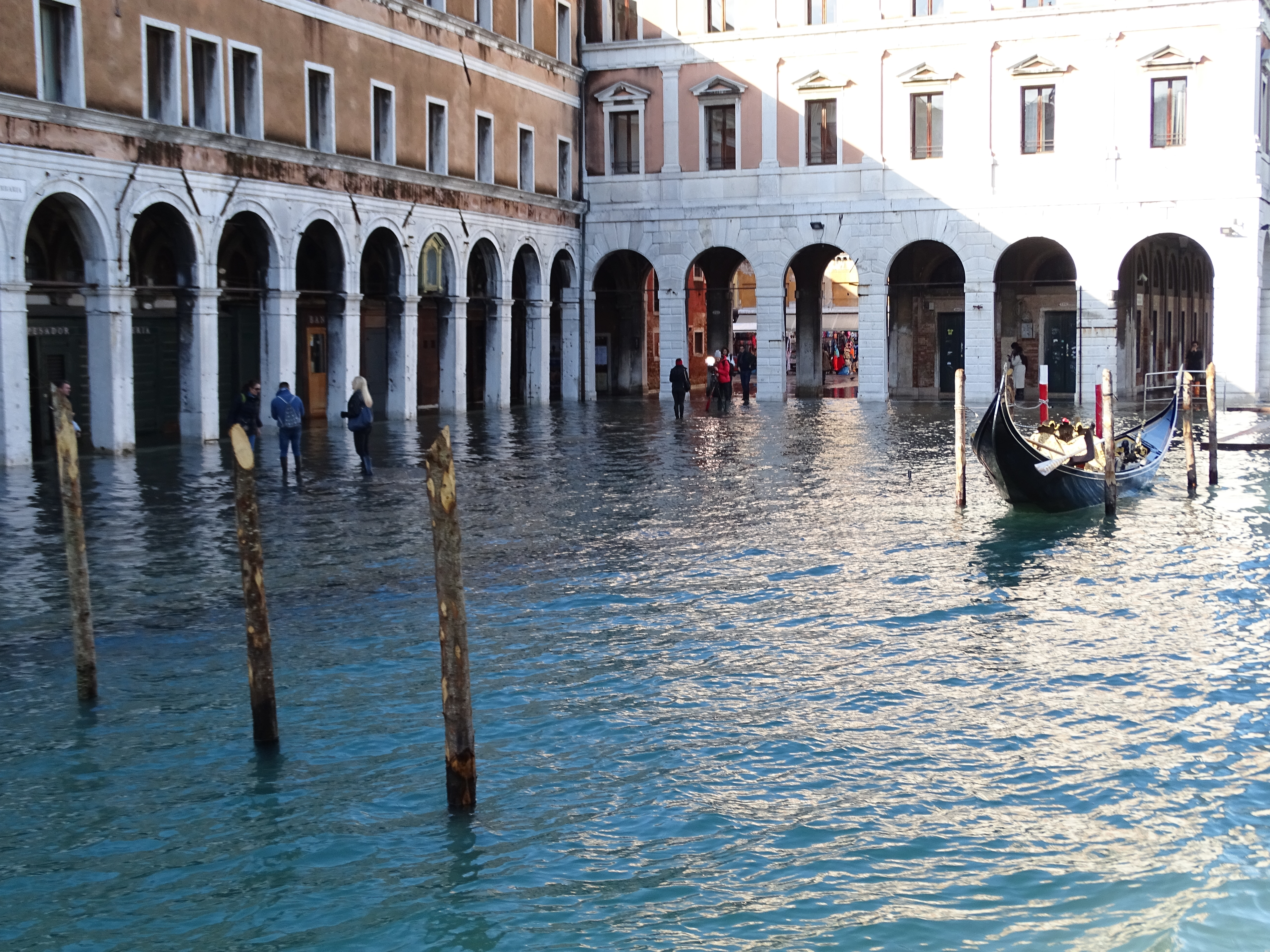 campo erberia, an der nordwestlichen Seite der Rialto-Brücke, in der Regel immer trocken